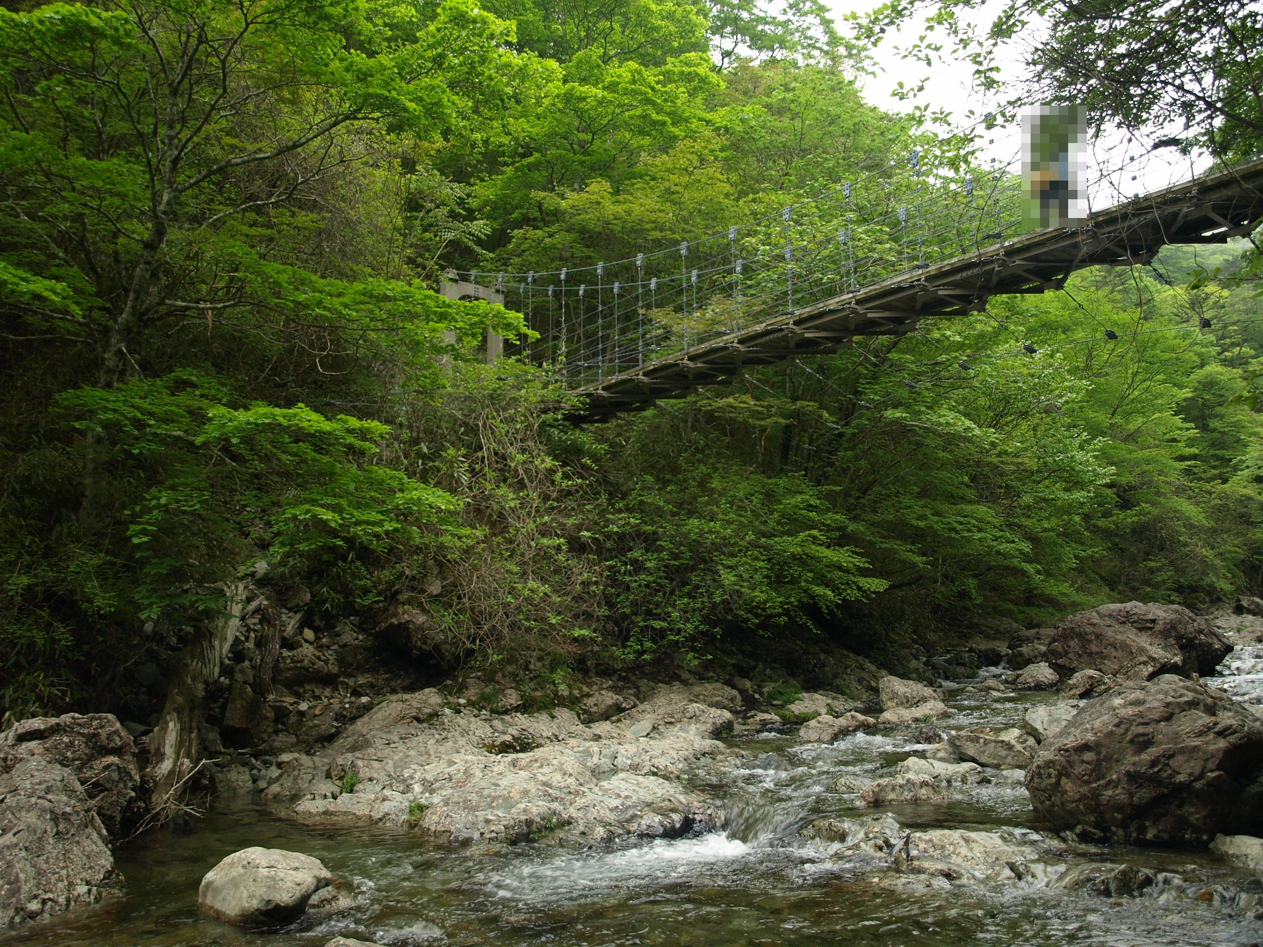 大台ケ原 Flickrから転載